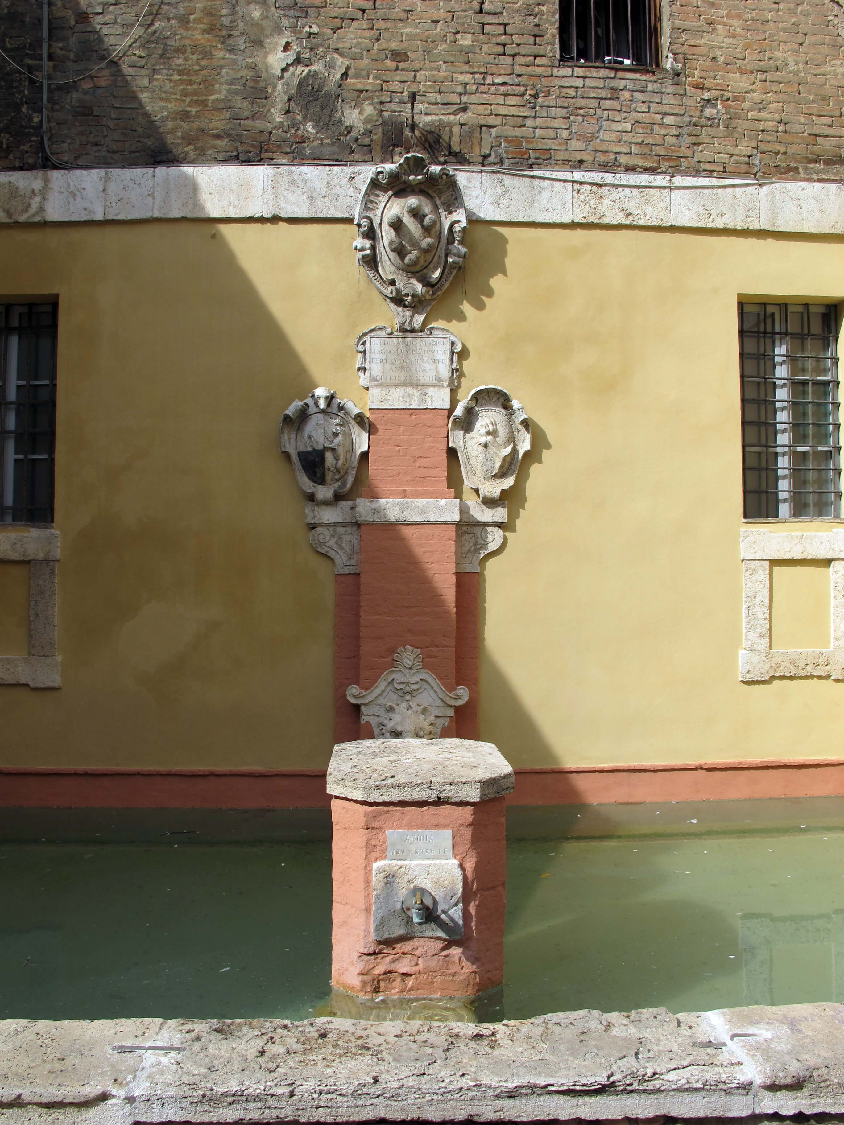 Siena